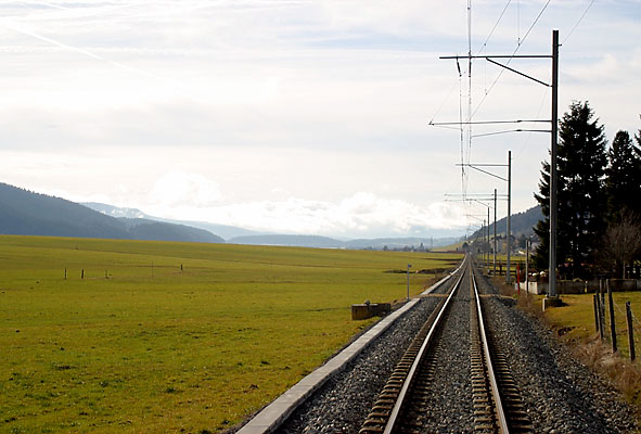 Blick auf das Vallée des Ponts bei La Sagne